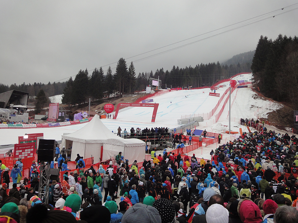 Zieleinlauf der Kandahar-Rennstrecke bei der alpinen Ski-Weltmeisterschaft 2011